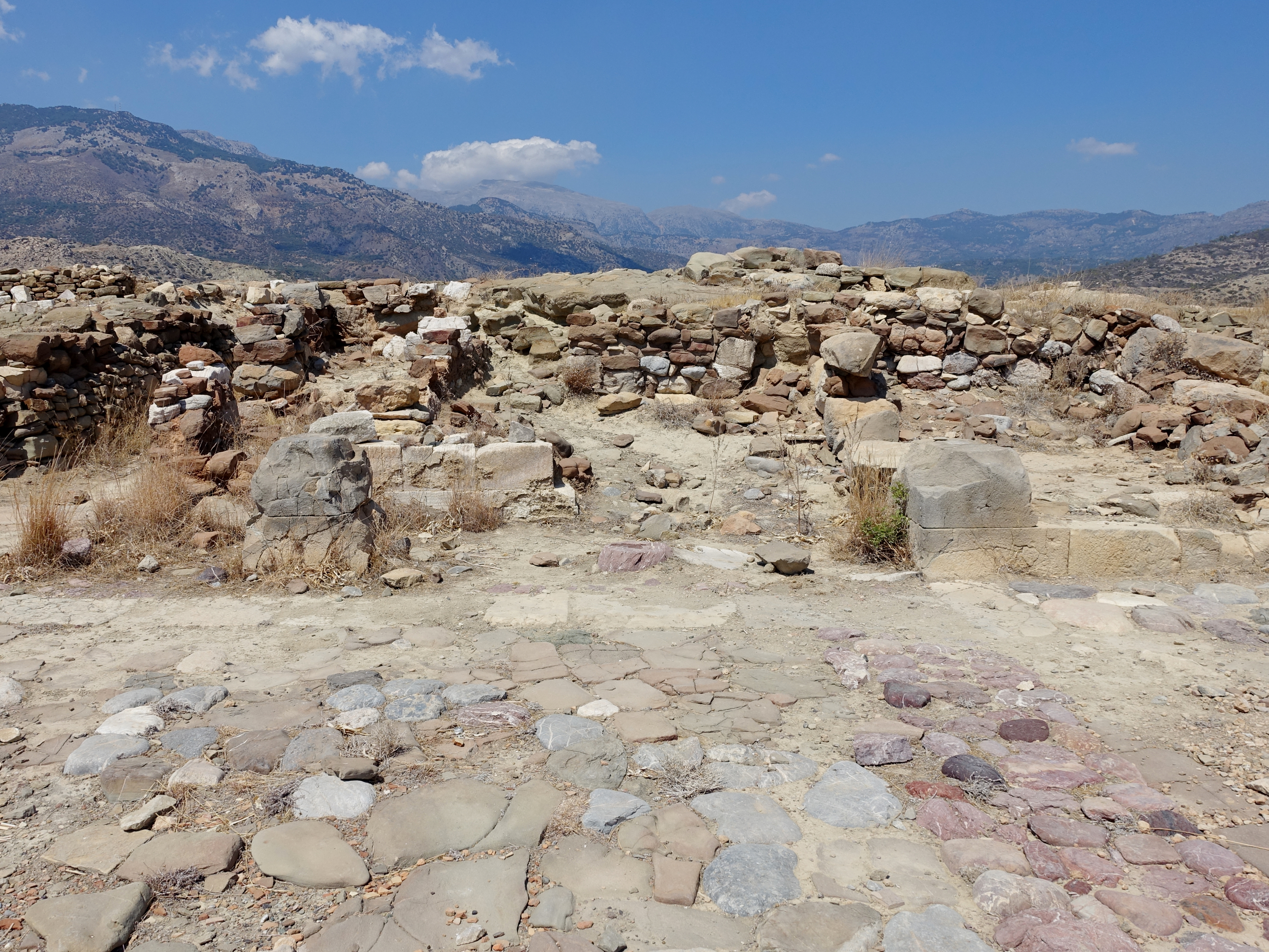 Ausgrabungsstätte von Pyrgos bei Myrtos, Kreta, Griechenland